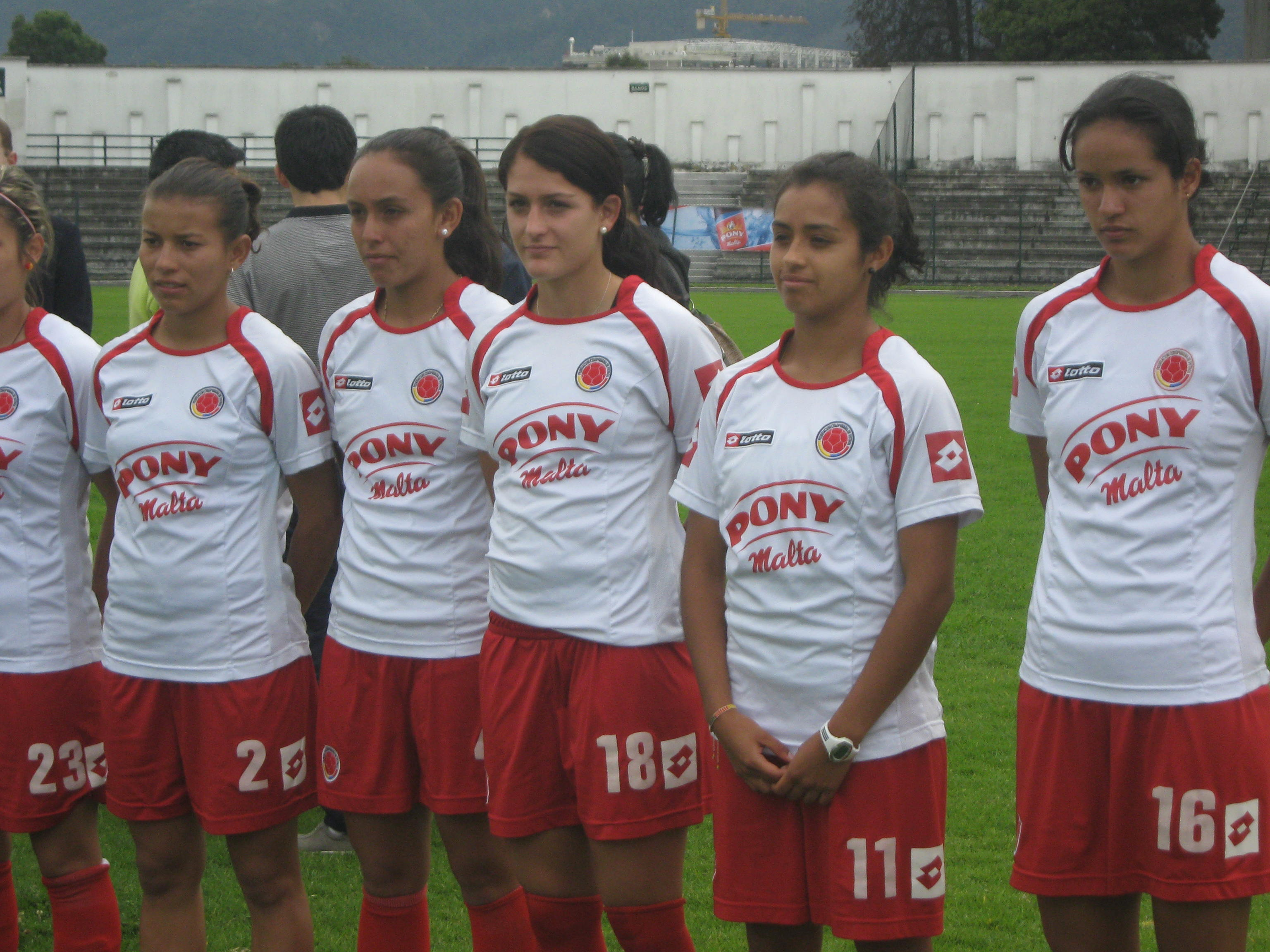 Lady Andrade primera de derecha a izquierda, durante una sesión fotográfica de la selección colombia al final de un entrenamiento en el estadio Alfonso López Pumarejo de la Universidad Nacional, días antes del mundial sub 20 realizado en Alemania.